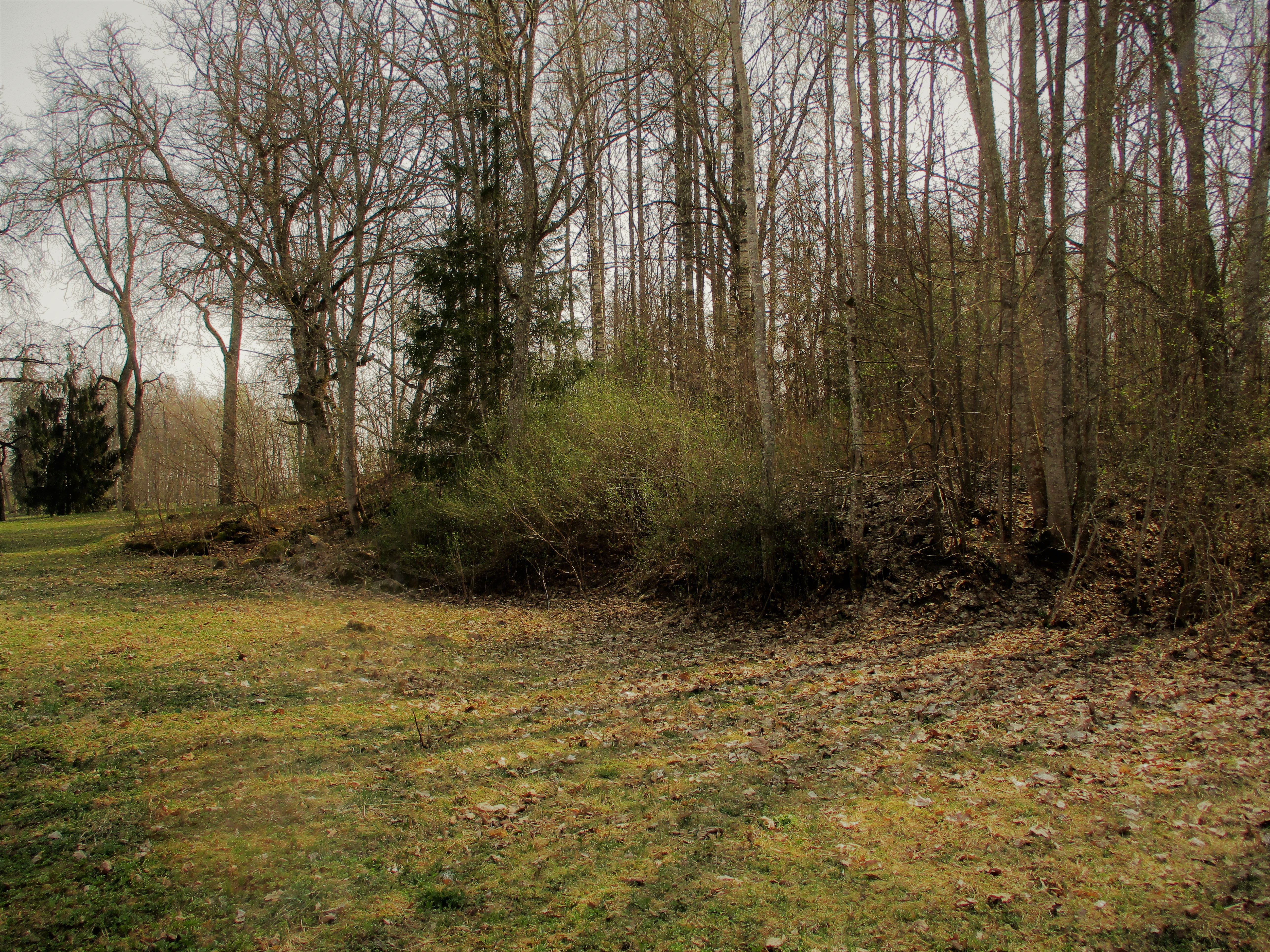 Vaade loodest linnuseala põhjapoolsele vallile. Linnusealal kasvavad puud ja põõsad.